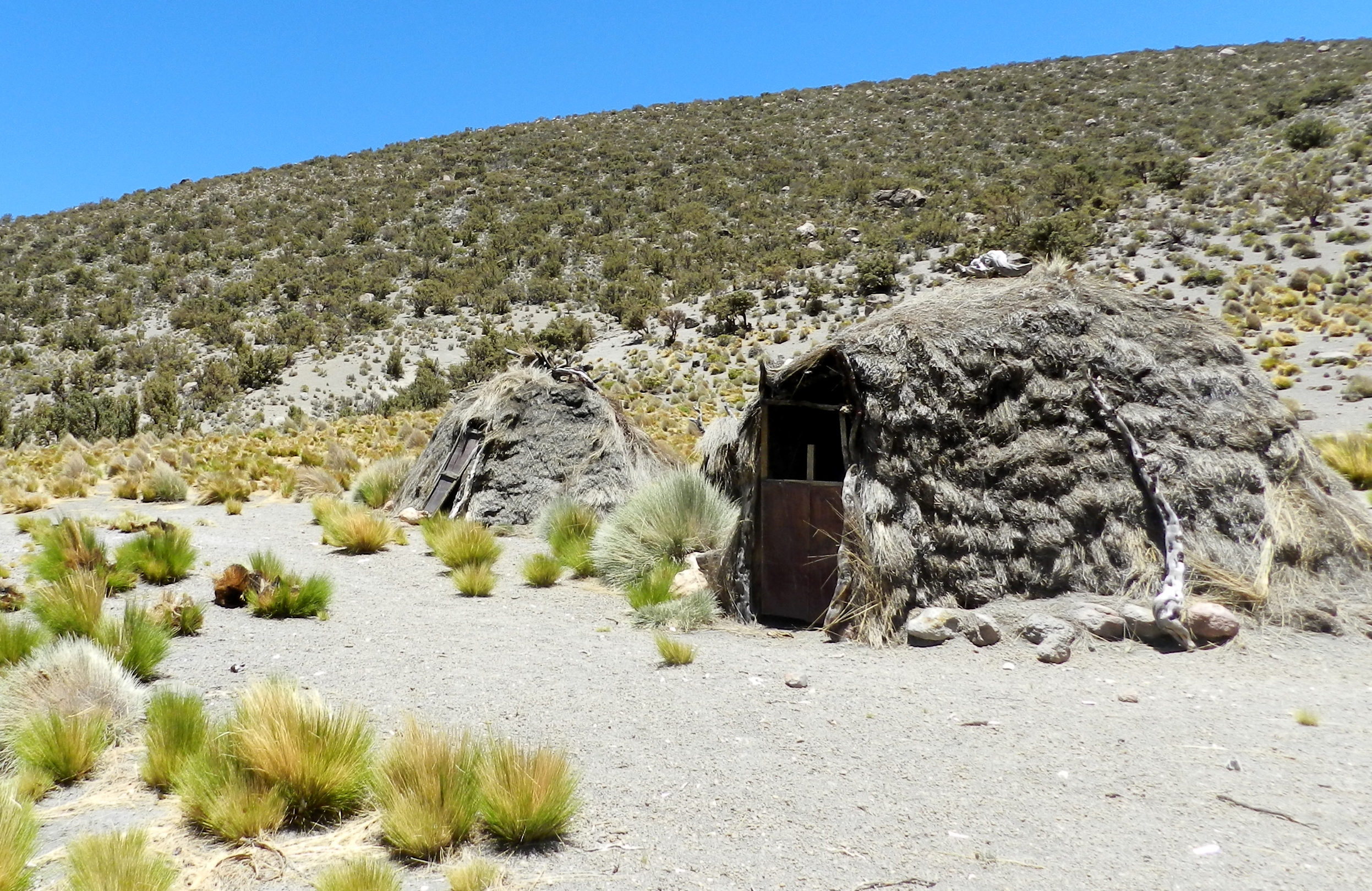 Cabañas de pastor en el valle de Junthuma cerca Sajama (Bolivia).